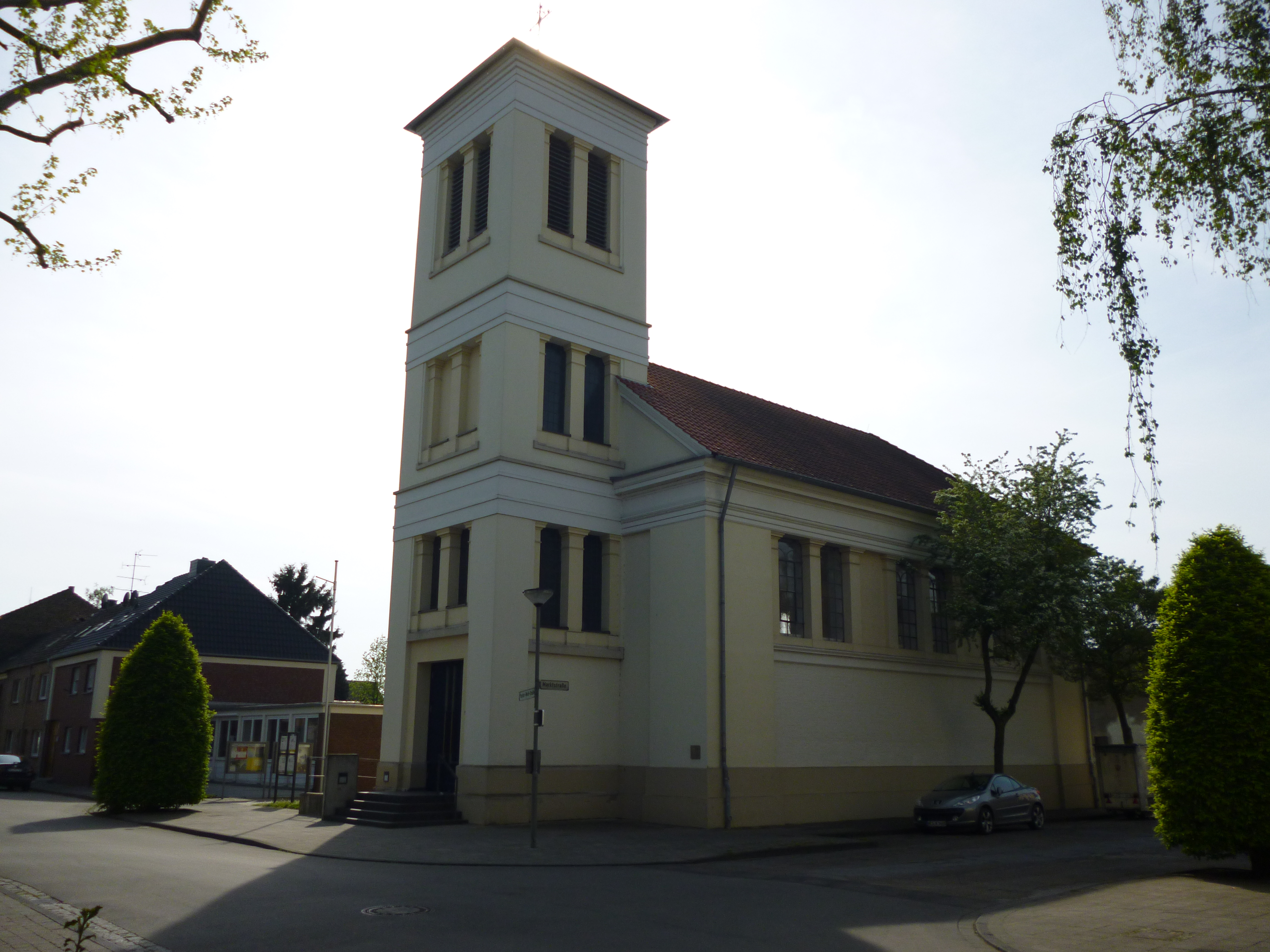 Evangelische Kirche Büderich